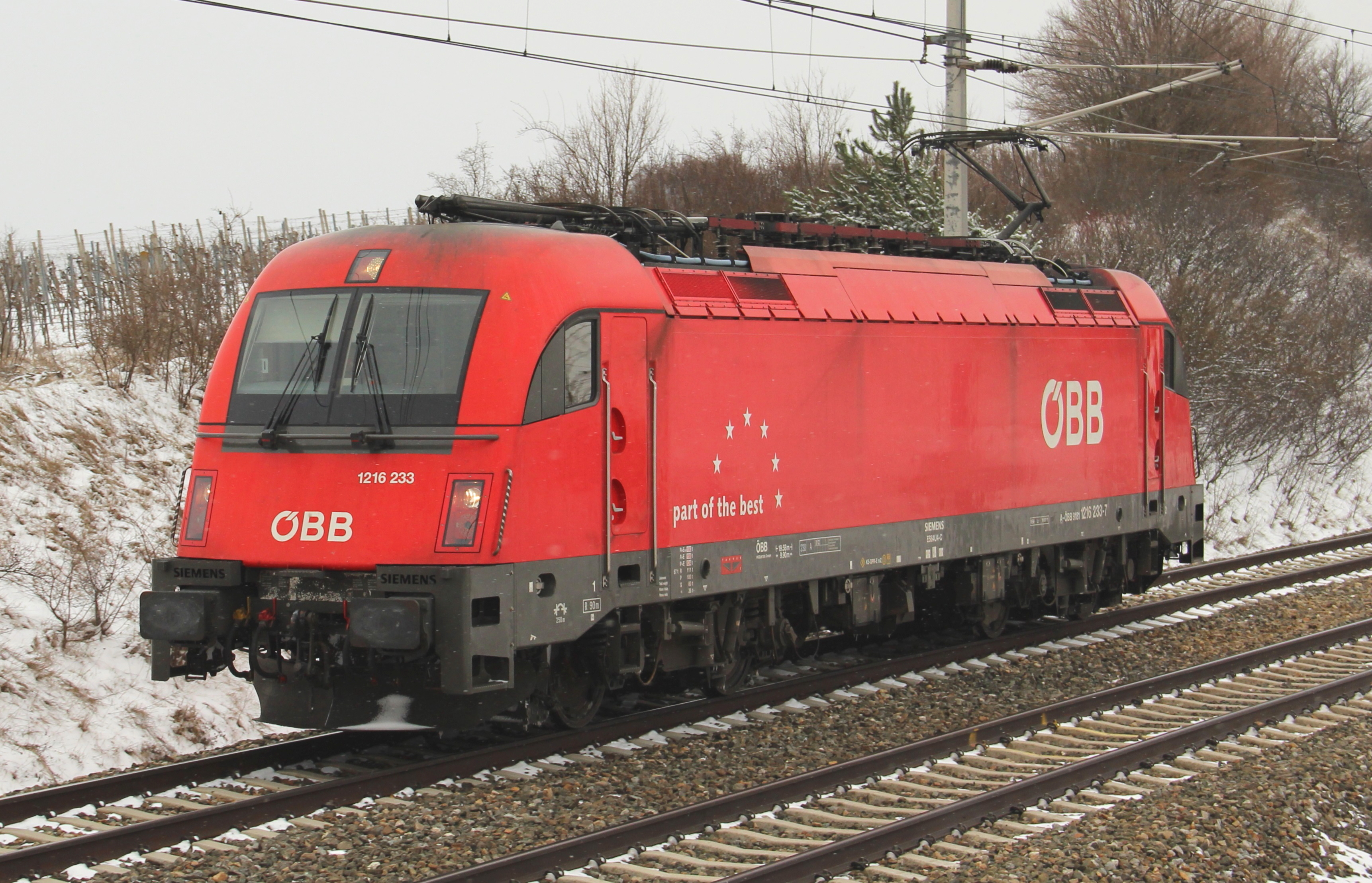 Die ÖBB 1216.233 fährt Lokzug von Wiener Neustadt nach Wien, hier bei Gumpoldskirchen